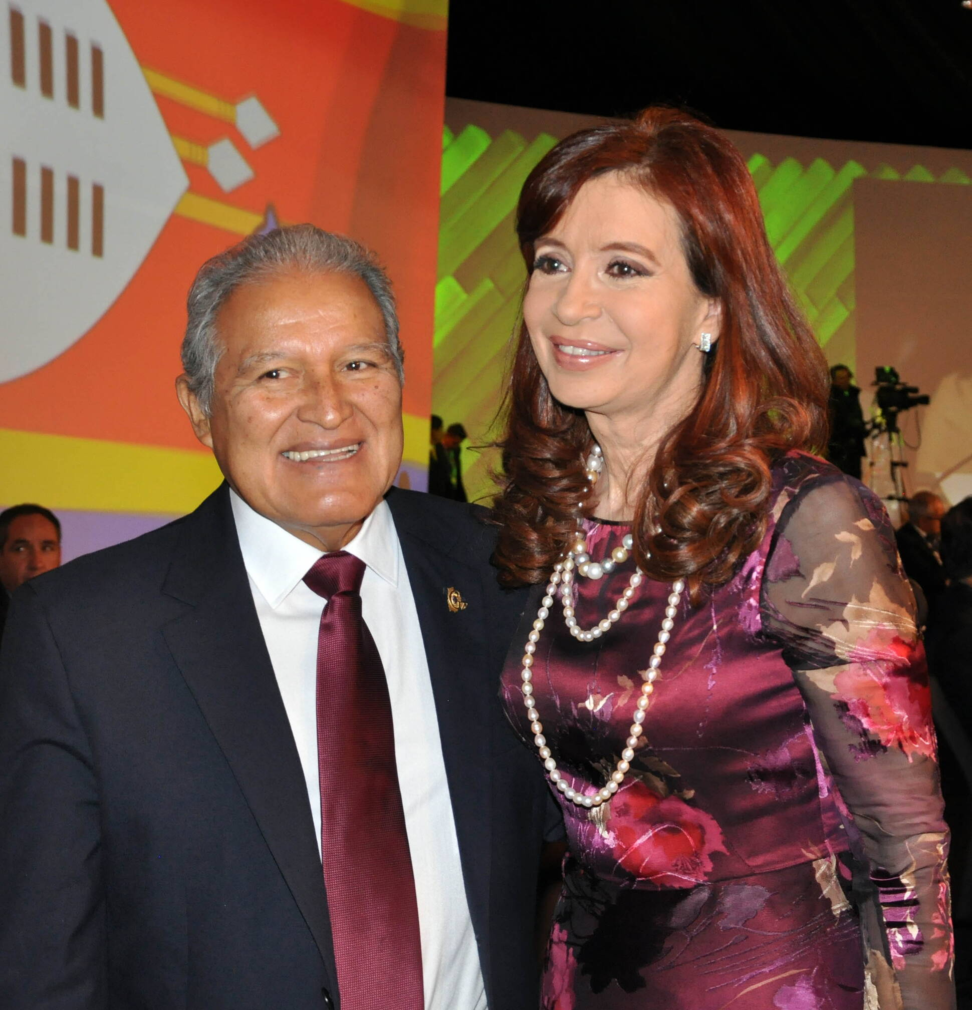 La presidenta Cristina Fernández participó de la cumbre del G77+China, "50 Aniversario por un Nuevo Orden Mundial para Vivir Bien", en Santa Cruz de la Sierra, Bolivia. Allí, la mandataria resaltó que el reclamo de los fondos buitre ante la justicia de Estados Unidos "pone en juego el sistema financiero y económico internacional" y llamó a los países participantes de la cumbre a que se pronuncien sobre las "prácticas financieras de expoliación", en relación también a la vigencia de prácticas colonialistas.